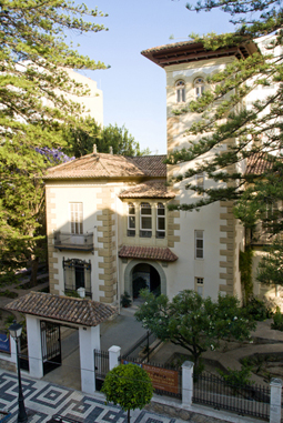 Fachada principal del Chalet de Centella (Villajoyosa)